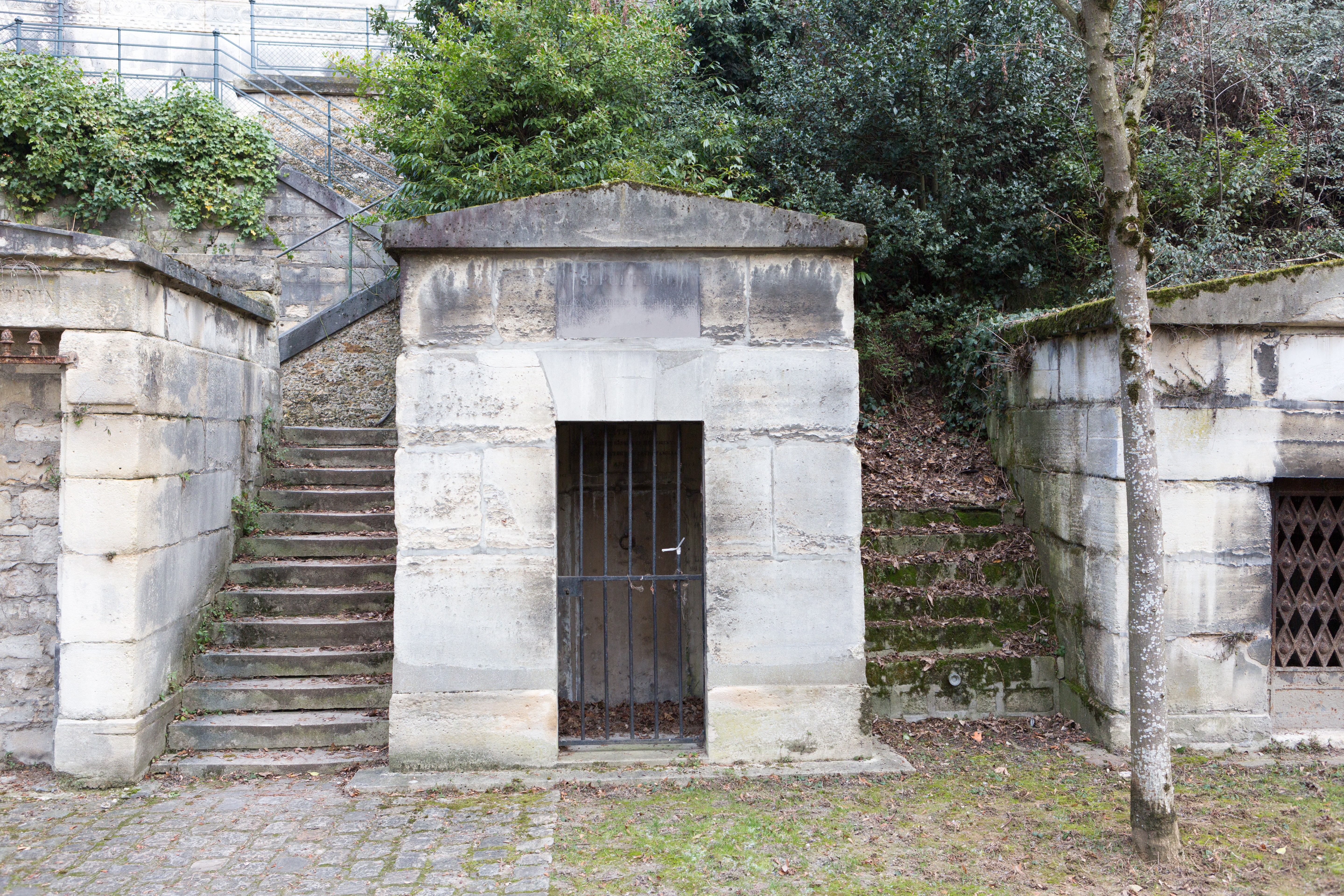 Sépulture de Jacques Laffitte (1767-1843), banquier ; Martin Laffitte (1773-1840), frère de Jacques Laffitte, député et directeur général du Mont-de-piété de Paris.